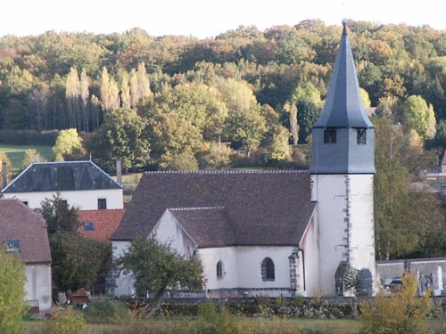 Vue du hameau de Solonge